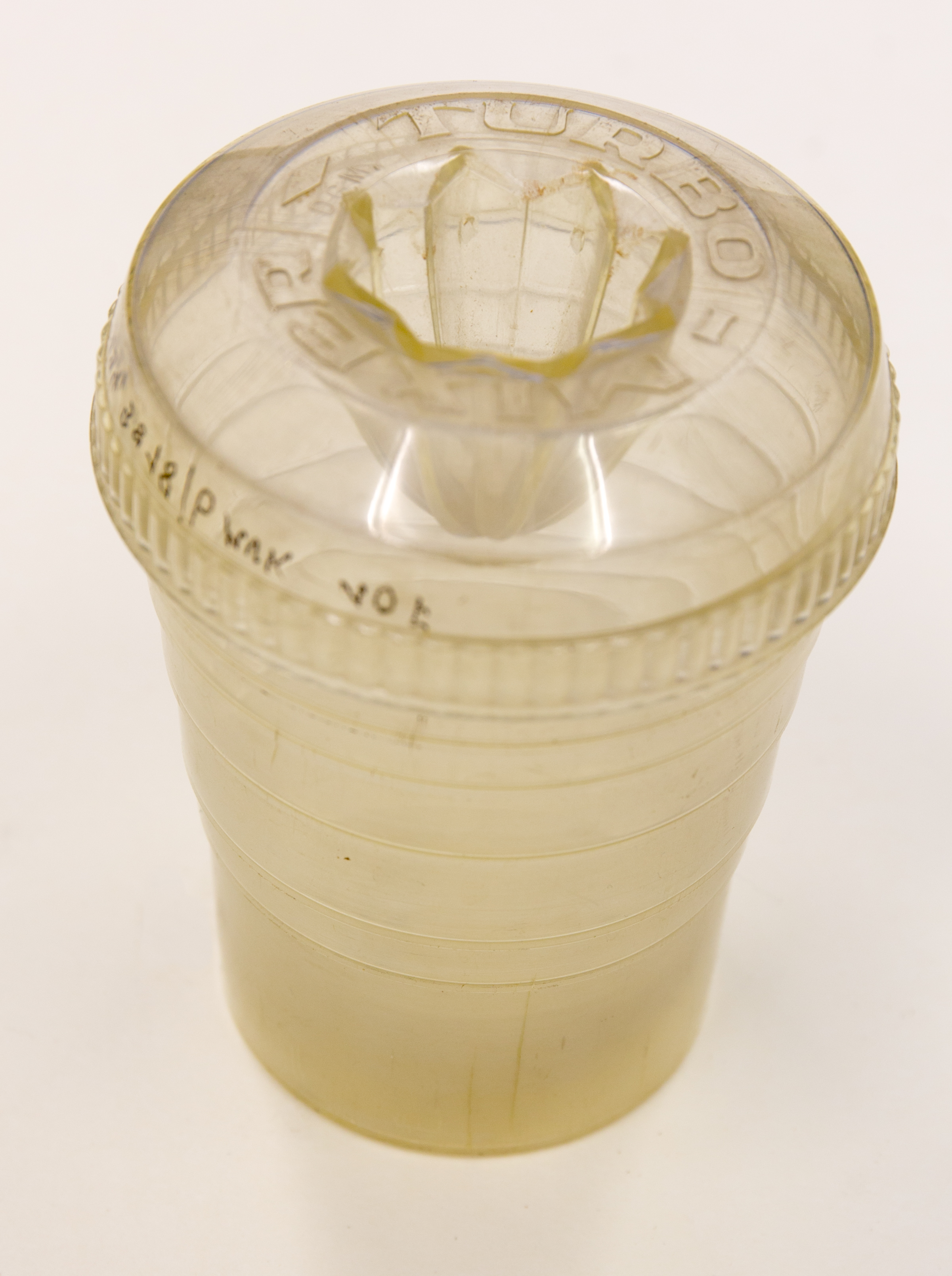 Turbo Mixer, Inventar des MEK